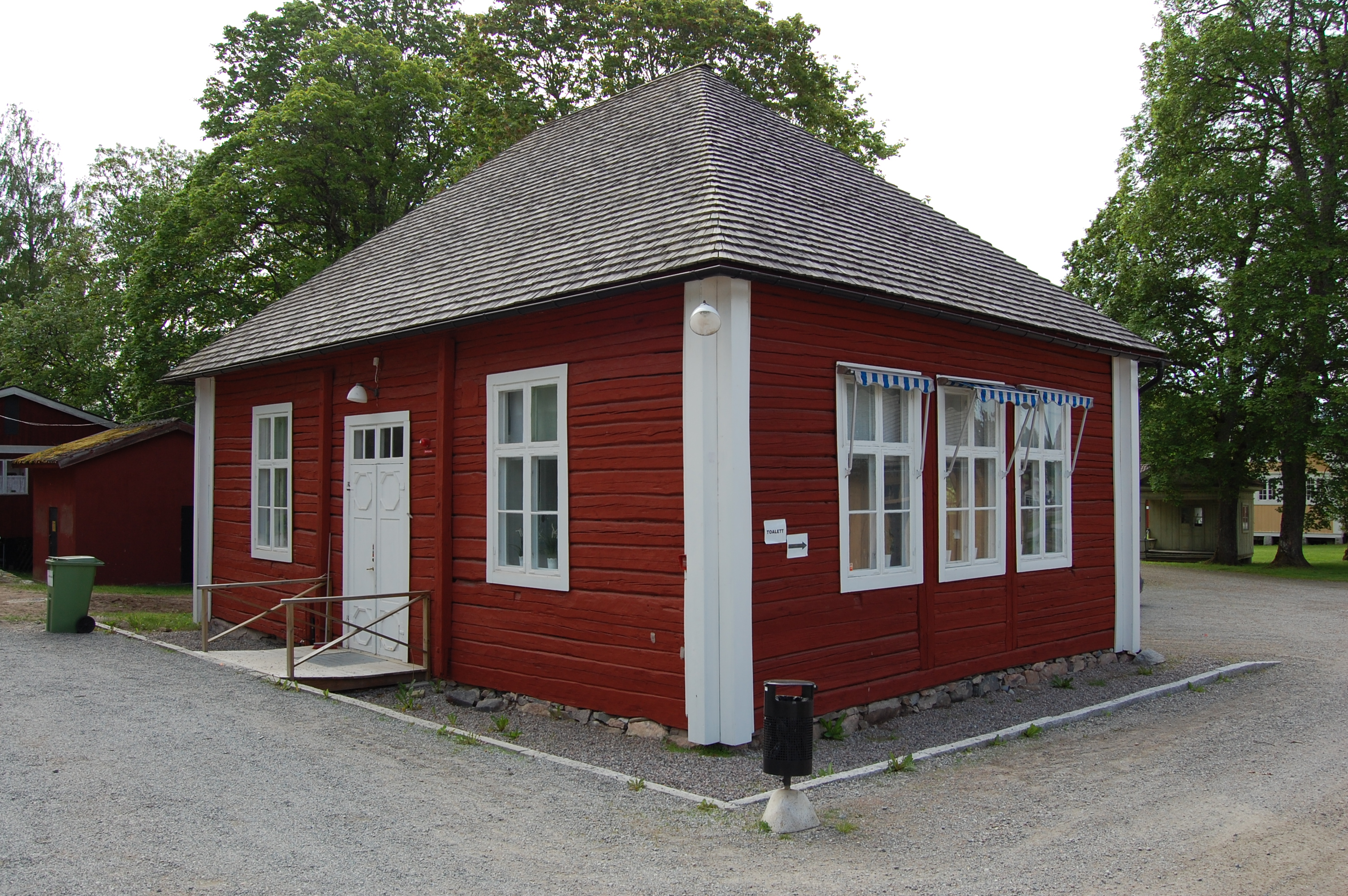 Brunnskontoret på Sätra brunn (kurort)